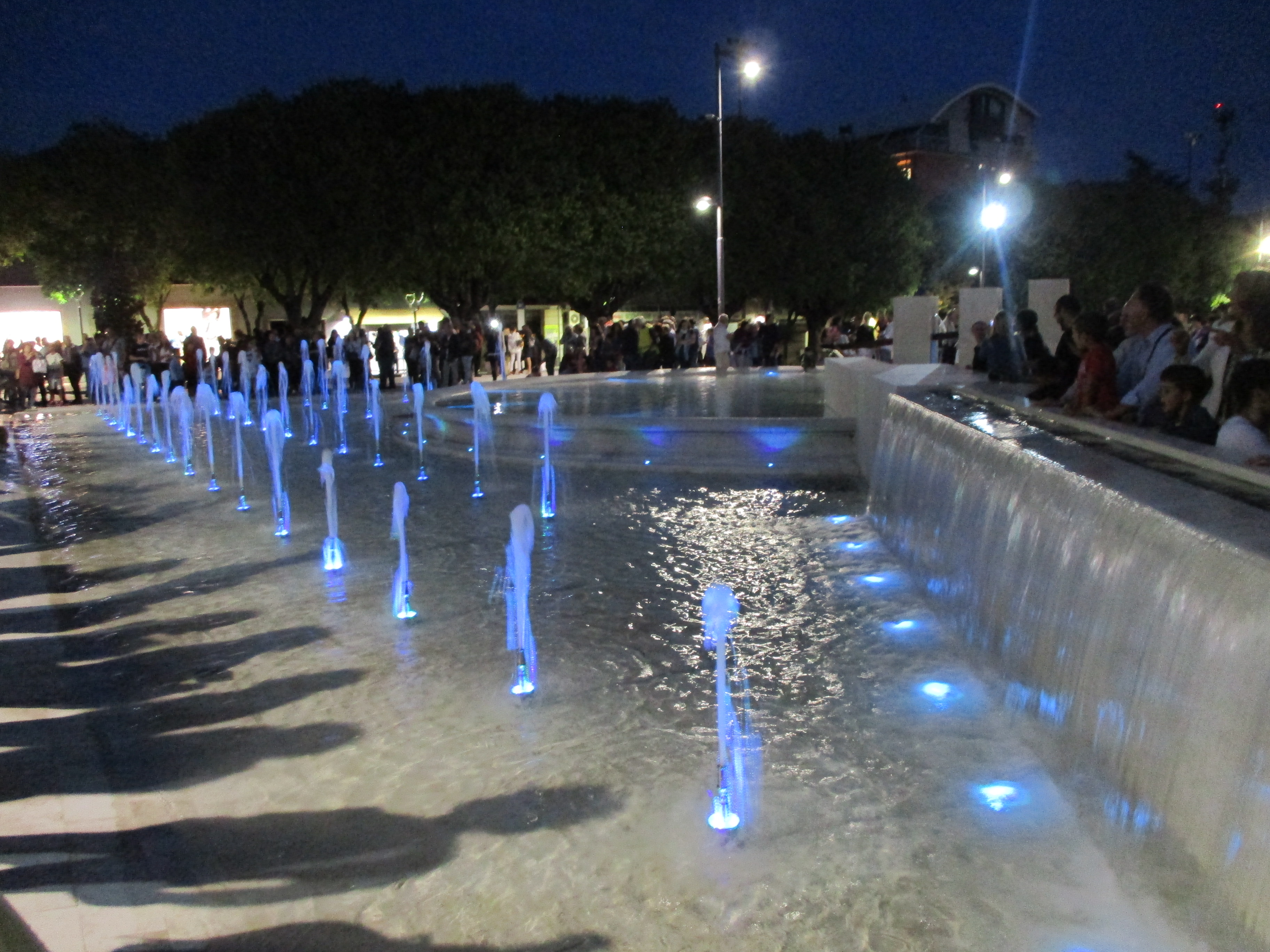 La nuova fontana